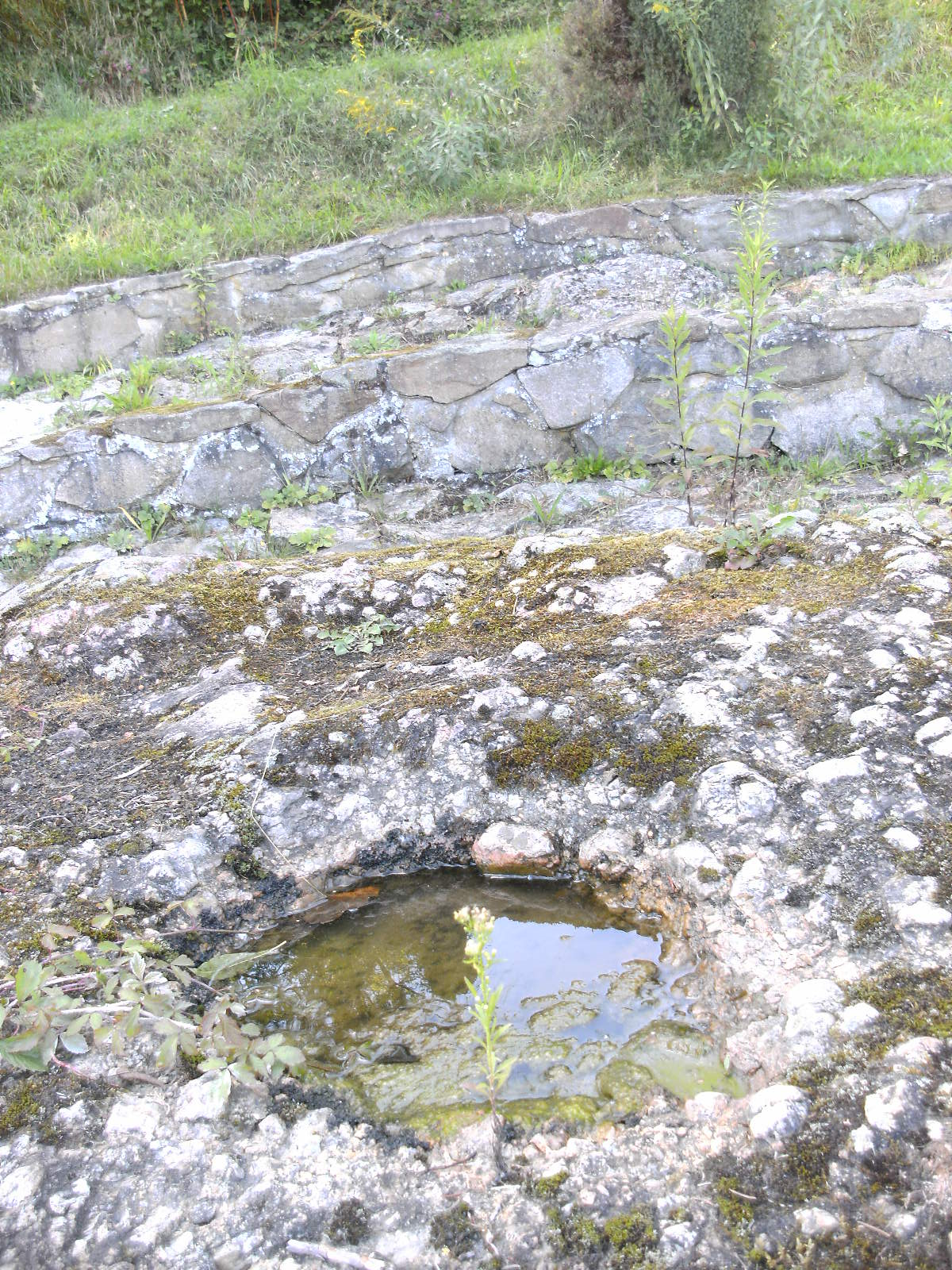 Schalenstein am stein- und bronzezeitlichen Kultplatz Berglitzl in Gusen/Langenstein Oberösterreich